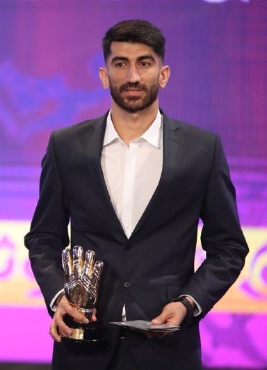 مراسم برترین‌های فوتبال ایران ۱۳۹۶-۹۷